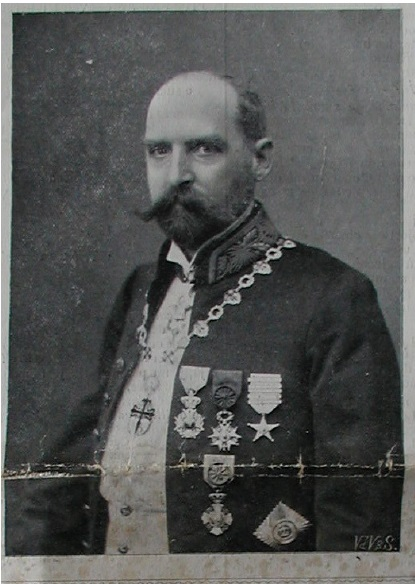 Félix Fuchs als vicegouverneur van Congo Vrijstaat, Tribune Congolaise, 1907